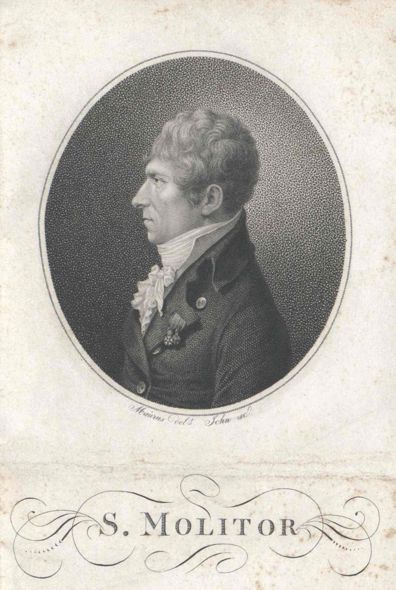 Simon Molitor; Wien, Österreichische Nationalbibliothek, Bildarchiv und Grafiksammlung, Porträtsammlung, Inventar-Nr. PORT_00155909_01